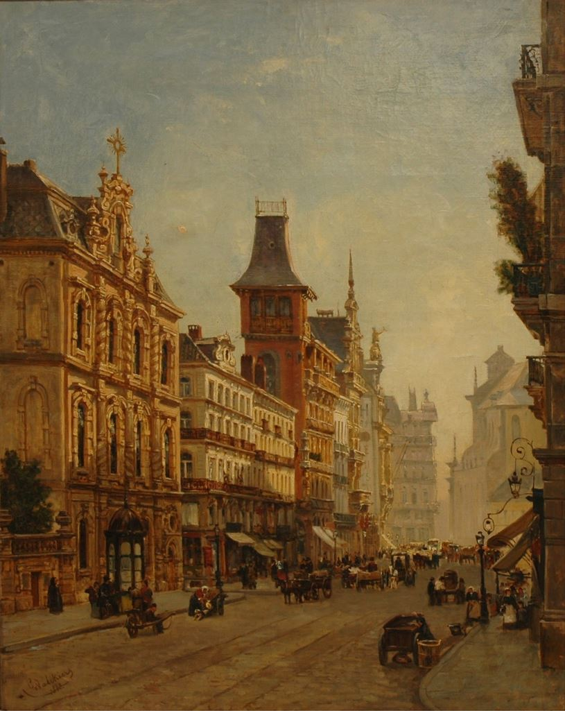 Gustave Walckiers, Boulevard du Nord (Musée Liège)